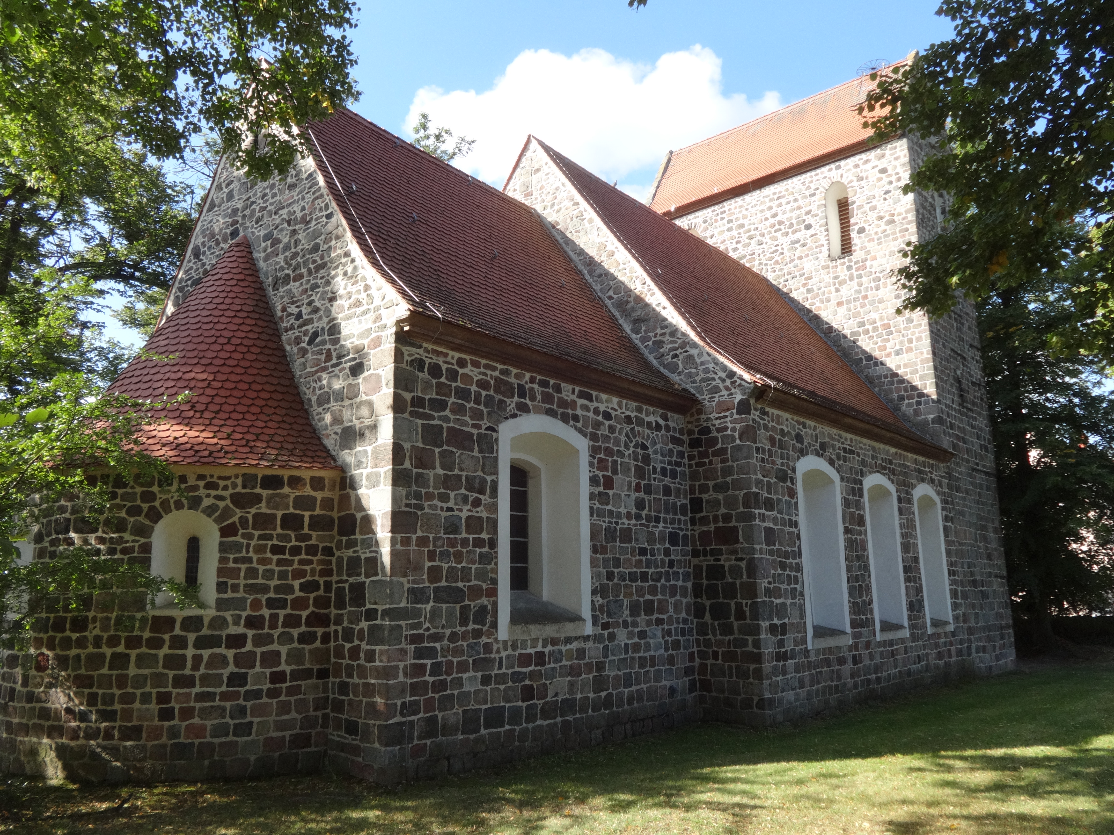 Die Feldsteinkirche in Waltersdorf ist ein spätromanischer Saalbau aus der Mitte des 13. Jahrhunderts in der Gemeinde Schönefeld im Landkreis Dahme-Spreewald in Brandenburg.